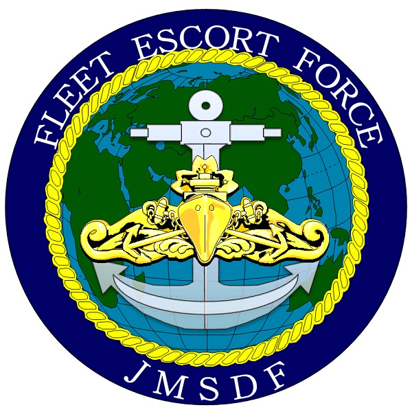 護衛艦隊ロゴマーク